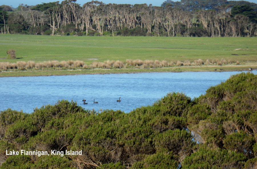 King Island Lake Flanagan